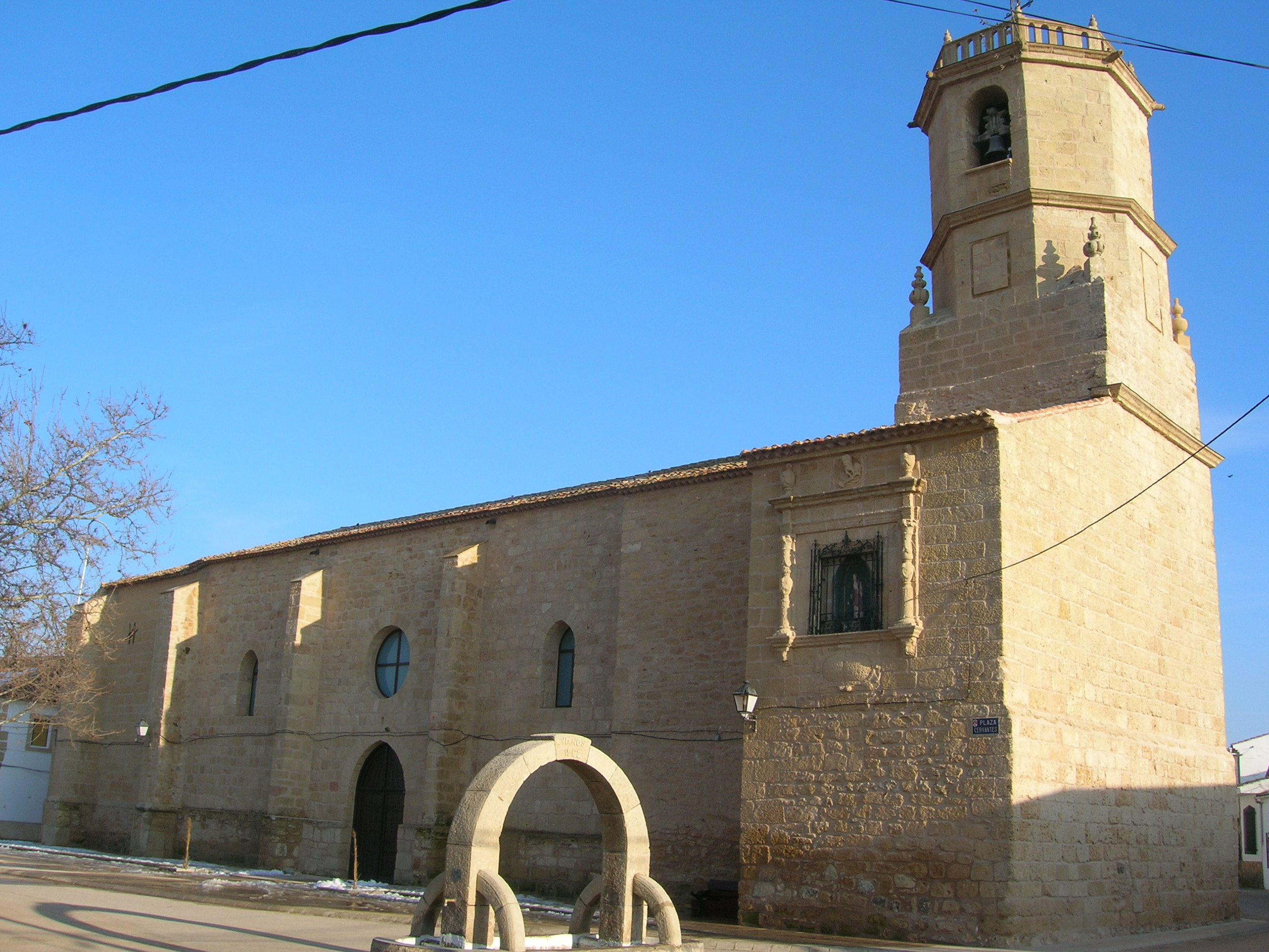 Iglesia de Vianos, municipio de la provincia de Albacete, España.